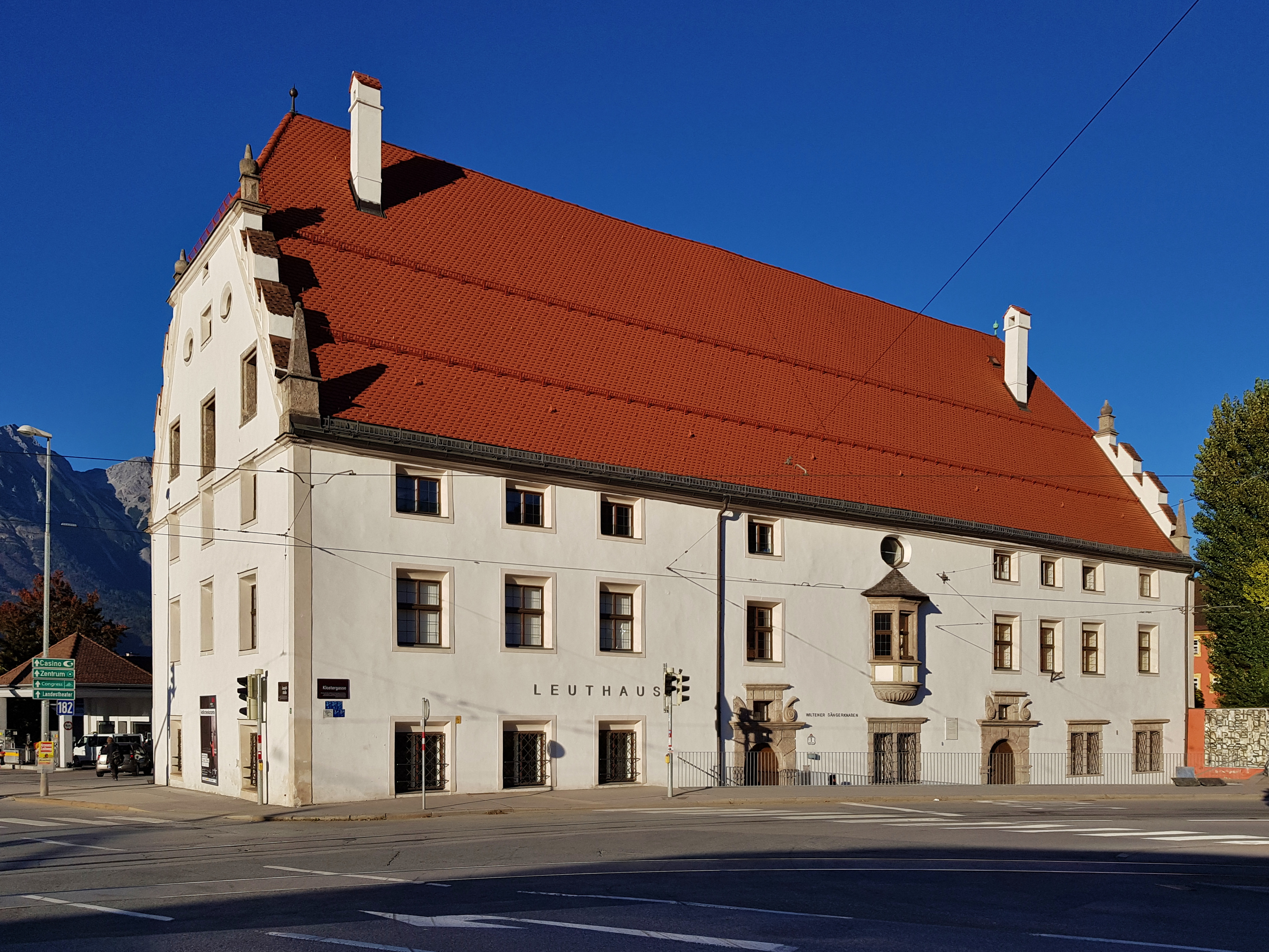 Stift Wilten Leuthaus This media shows the remarkable cultural object in the Austrian state of Tyrol listed by the Tyrolean Art Cadastre with the ID 68348. (on tirisMaps, on tirisdienste.at, pdf, more images on Commons)